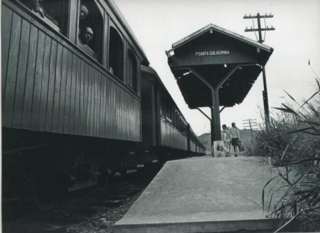 Trem da Leopoldina passando pela estação Parada Santa Guilhermina. Os vagões de madeira eram puxados pela Locomotiva 327, uma maria-fumaça.